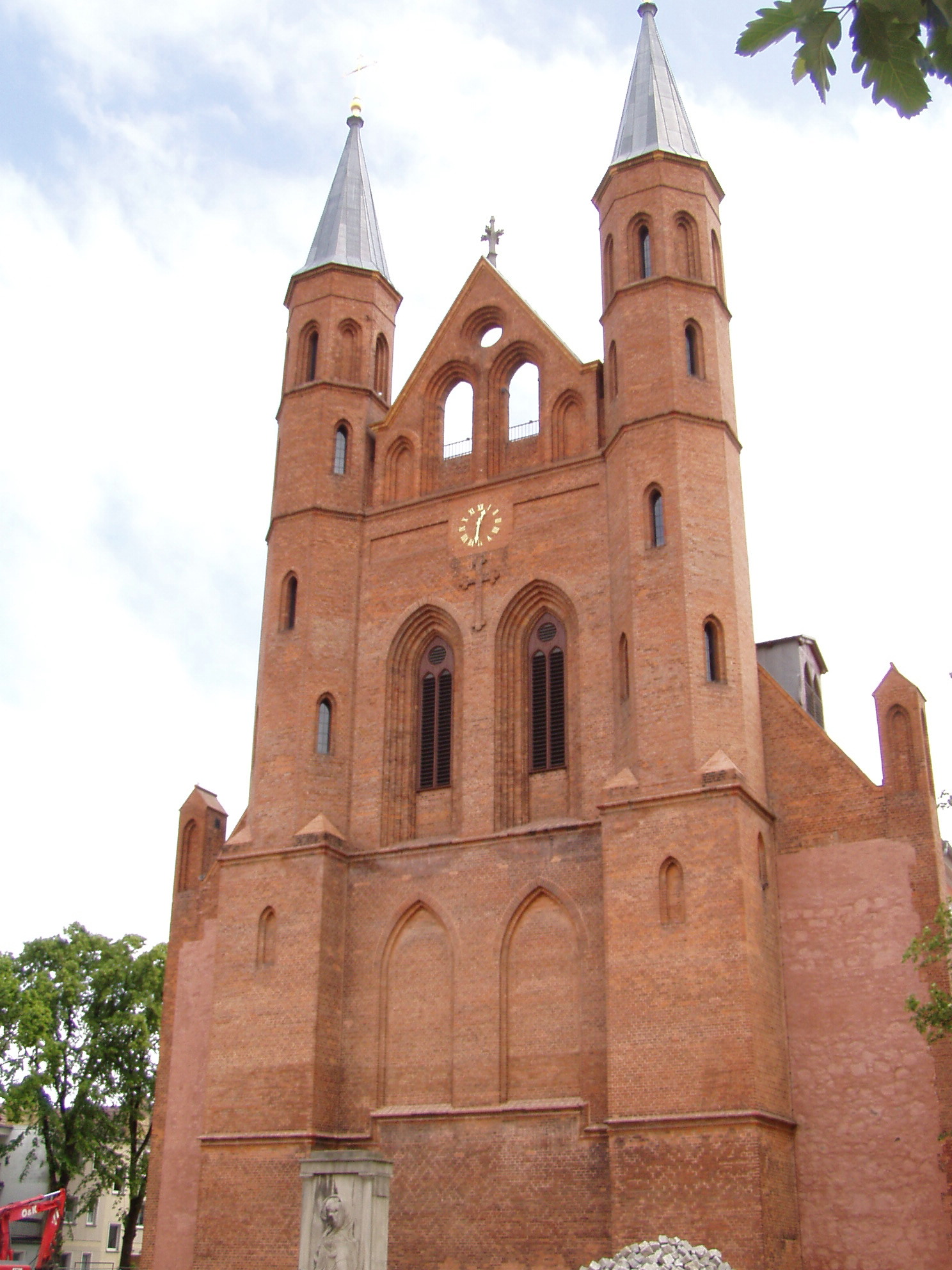 Kirche in Kyritz - Church in Kyritz (Germany)